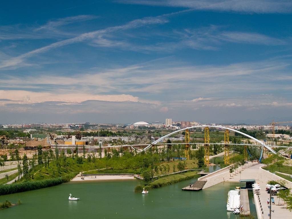 Bioparc vista desde el Parque de la Cabecera